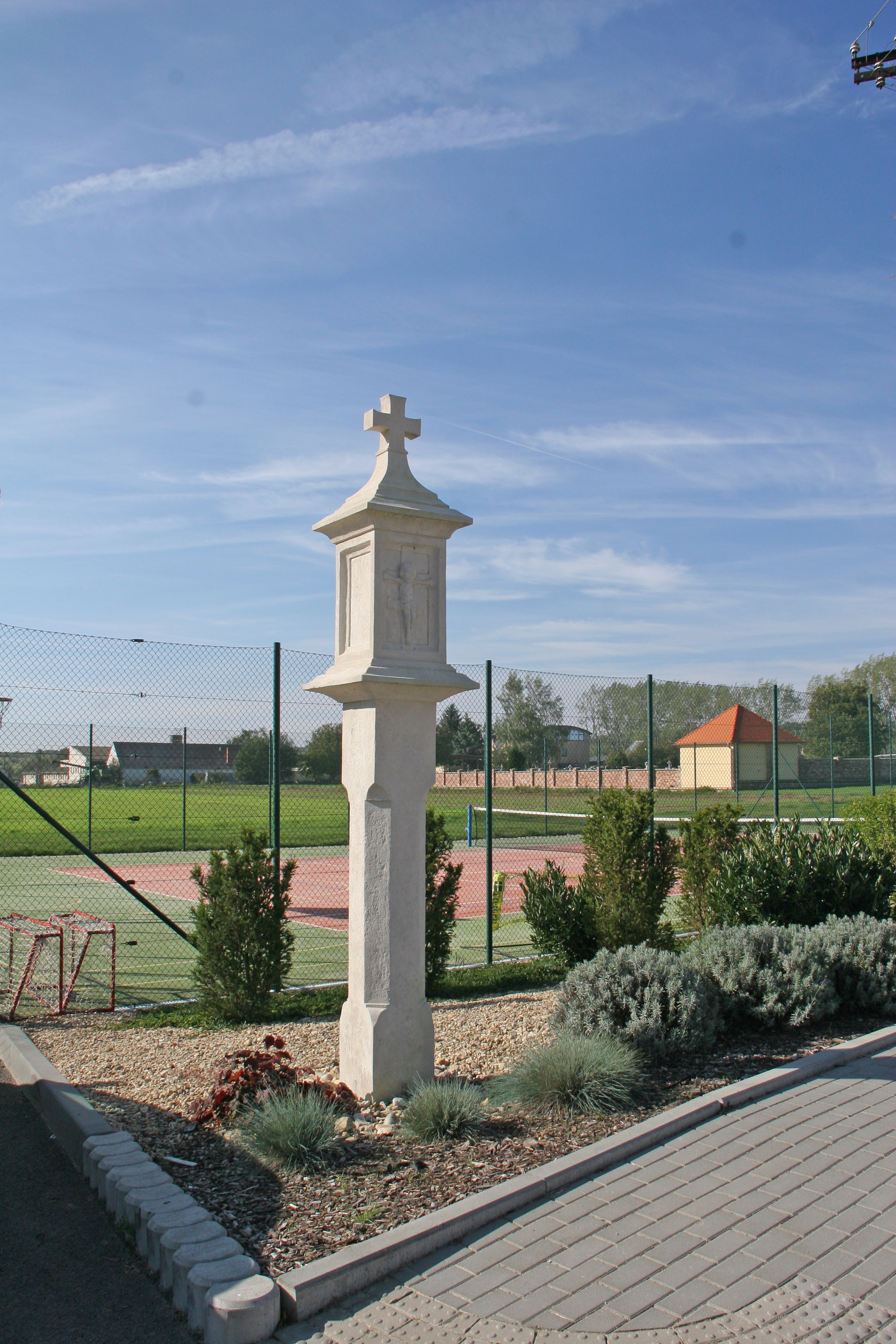 Boží muka, při školní zahradě, Mašovice.